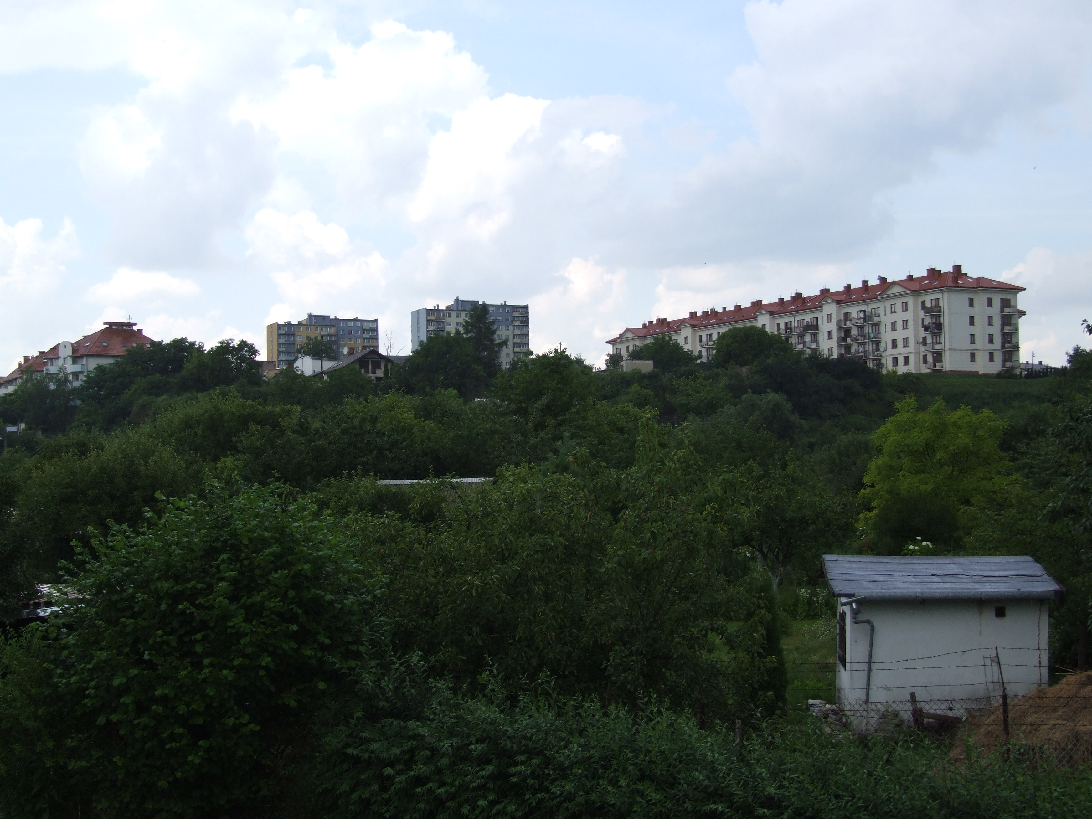 Widok ze ścieżki rowerowej na ogródki działkowe w dzielnicy Rury w Lublinie, w tle bloki po obu stronach ul. Nadbystrzyckiej.